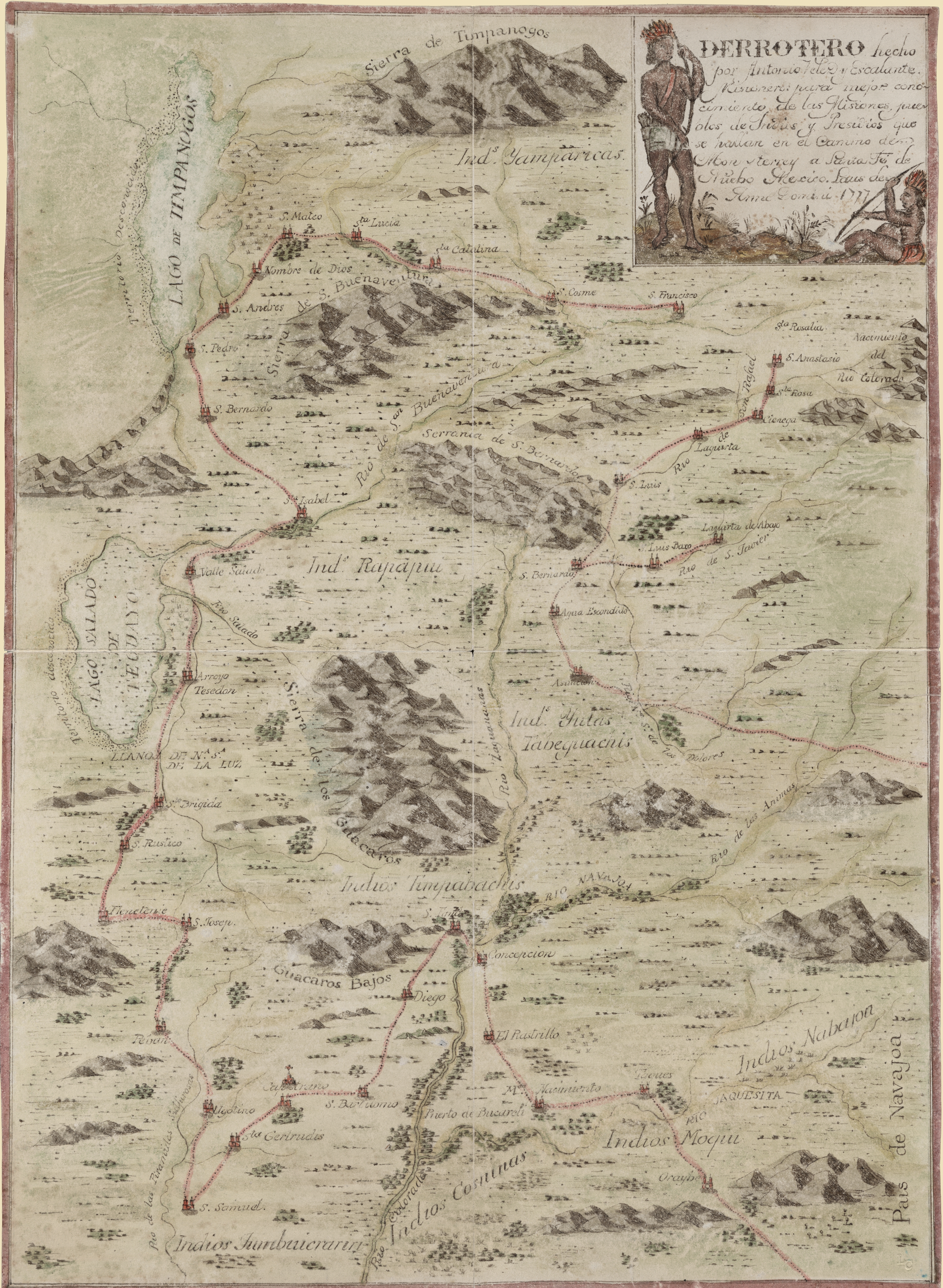 Escalante-dominguez expedition 1776, map, attributed by the Library of Congress to Antonio Vélez y Escalante, of the explored lands in today's Arizona and Utah. Original text: DERROTERO hecho por Antonio Vélez y Escalante, misionero para mejor conocimiento de las misiones, pueblos de indios y presidios que se hallan en el Camino de Monterrey a Santa Fe de Nuebo Mexico